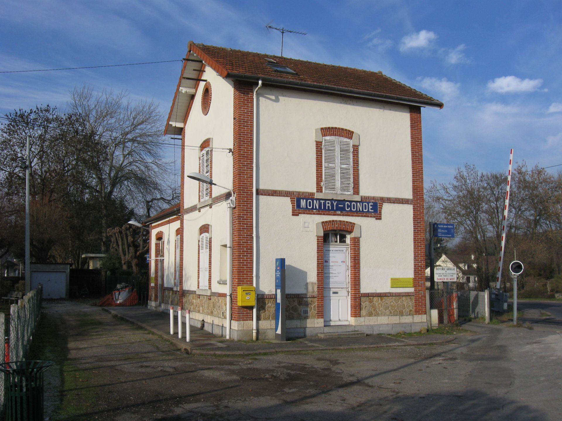 Gare de Montry - Condé. (commune de Montry, département de la Seine-et-Marne, région Île-de-France).